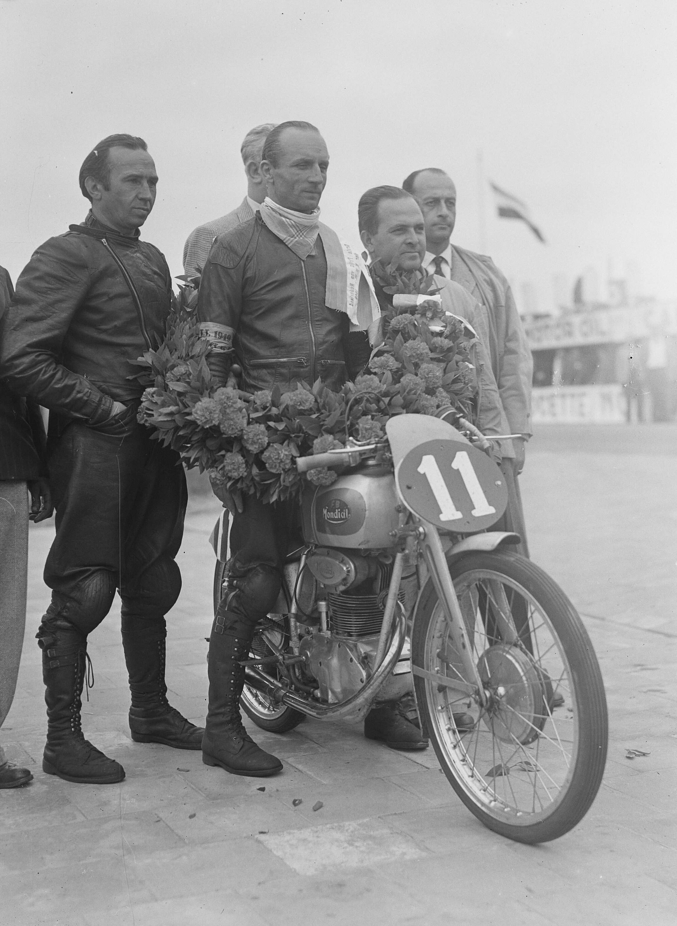 Collectie / Archief : Fotocollectie Anefo Reportage / Serie : TT Assen 1949 Beschrijving : Nello Pagani winnaar 125cc klasse op Mondial. Datum : 9 juli 1949 Locatie : Assen Trefwoorden : motorsport Persoonsnaam : Pagani, Nello Fotograaf : Noske, J.D. / Anefo Auteursrechthebbende : Nationaal Archief Materiaalsoort : Glasnegatief Nummer archiefinventaris : bekijk toegang 2.24.01.09 Bestanddeelnummer : 903-4819